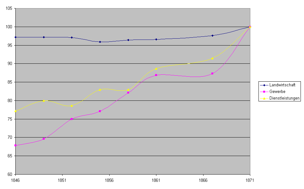 Wachstum der Beschäftigten nach Wirtschaftsektoren in Deutschland 1846-1871 (Zahlen nach Sozialgeschichtliches Arbeitsbuch 1v, S.52)